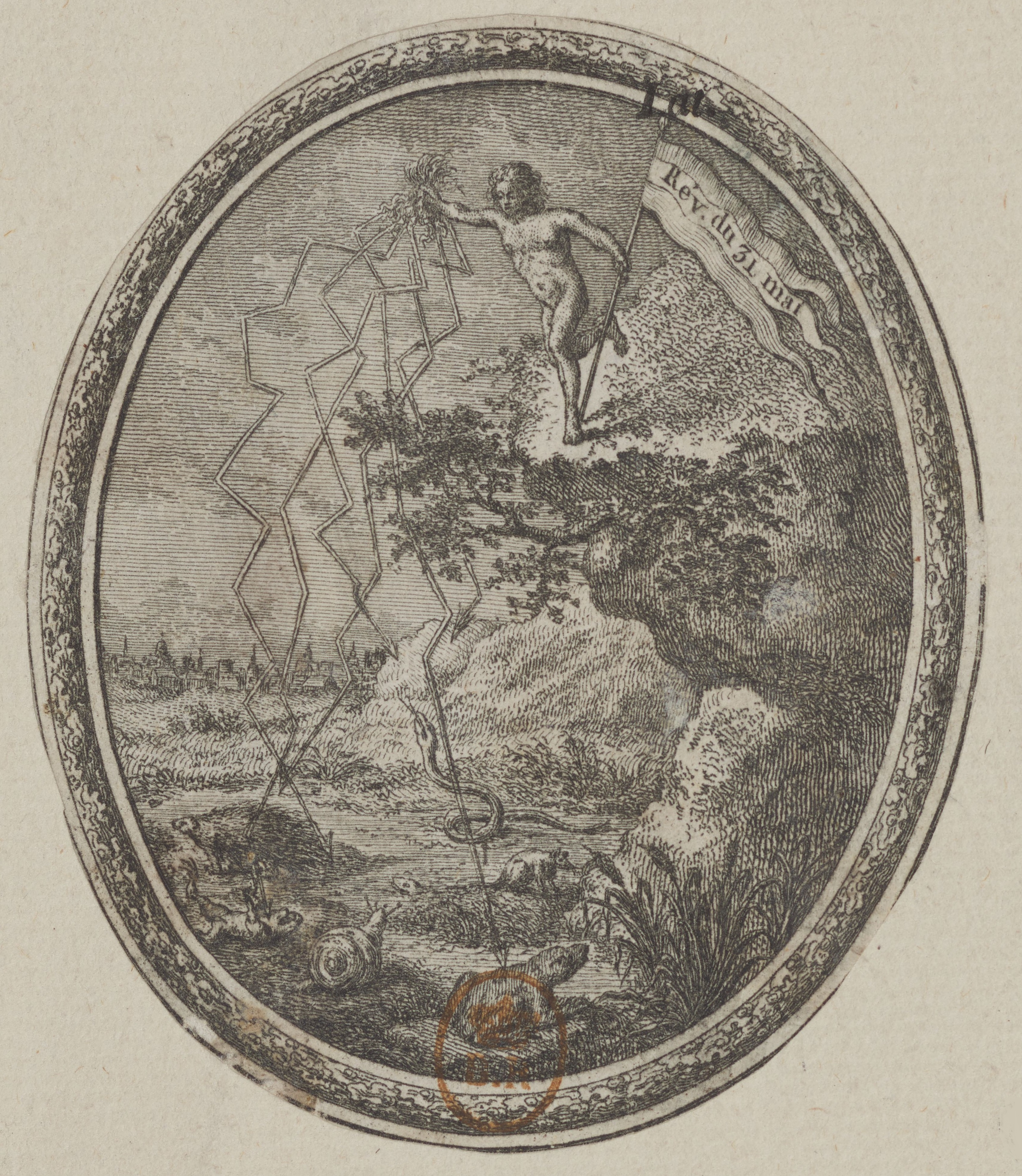 Figure allégorique foudroyant diverses créatures (serpents, grenouilles, escargots) en brandissant un drapeau sur lequel figure l'inscription Rév.[olution] du 31 mai célébrant la chute des Girondins lors des journées insurrectionnelles des 31 mai et 2 juin 1793.